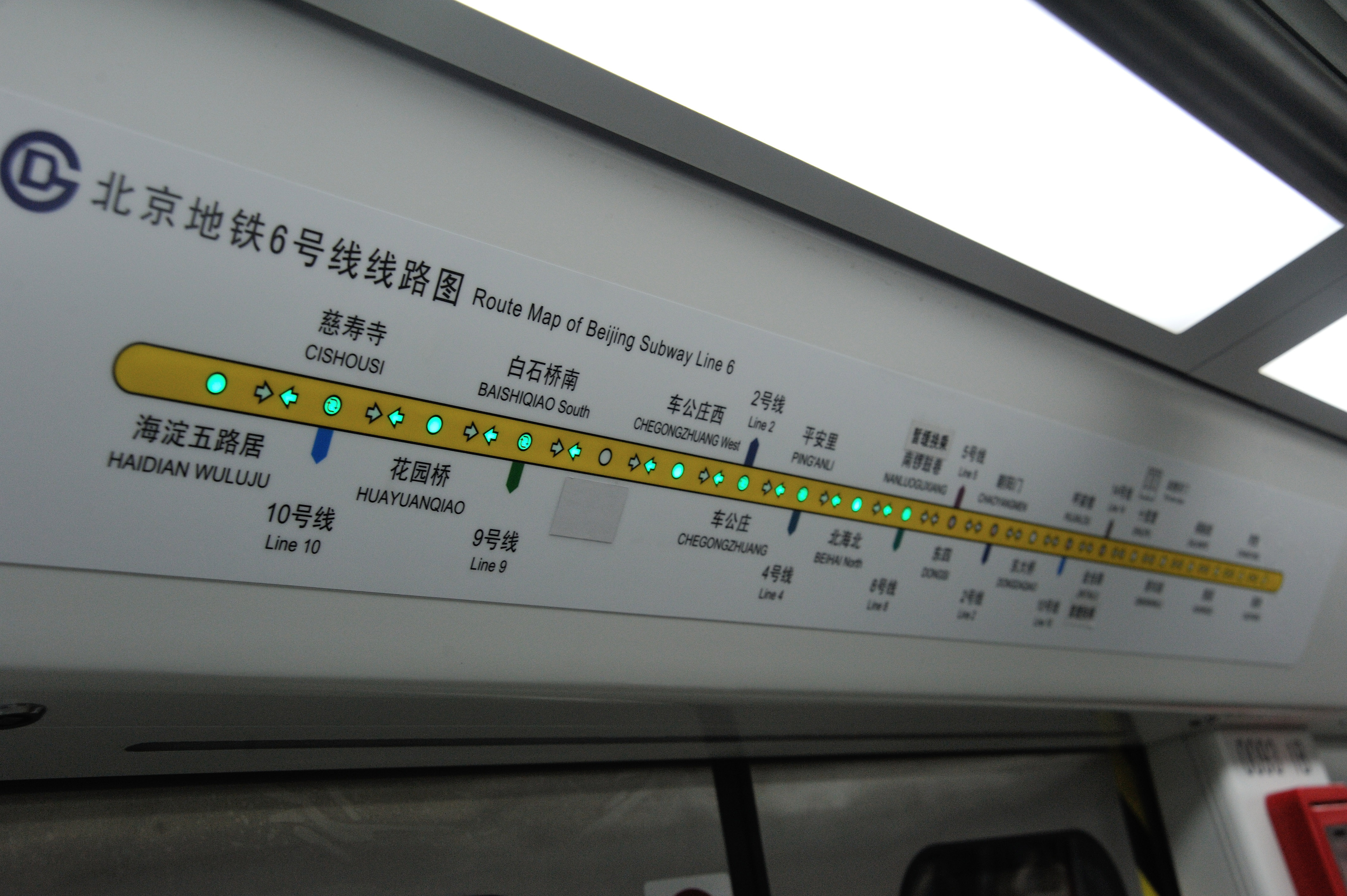 北京地铁6号线闪灯图，2012年12月31日